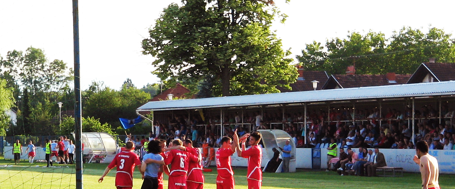 Nogometni klub Đurđenovac